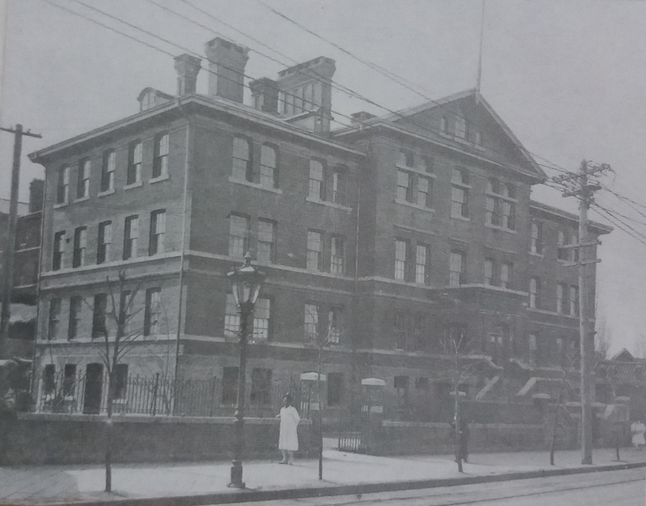 中文（中国大陆）: 世福兰斯医院